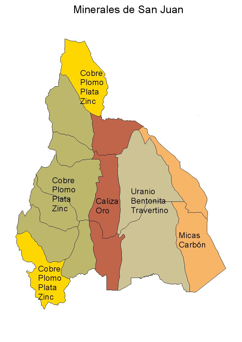 Mapa que representa la distribución de los minerales que posee el territorio de la Provincia de San Juan, Argentina